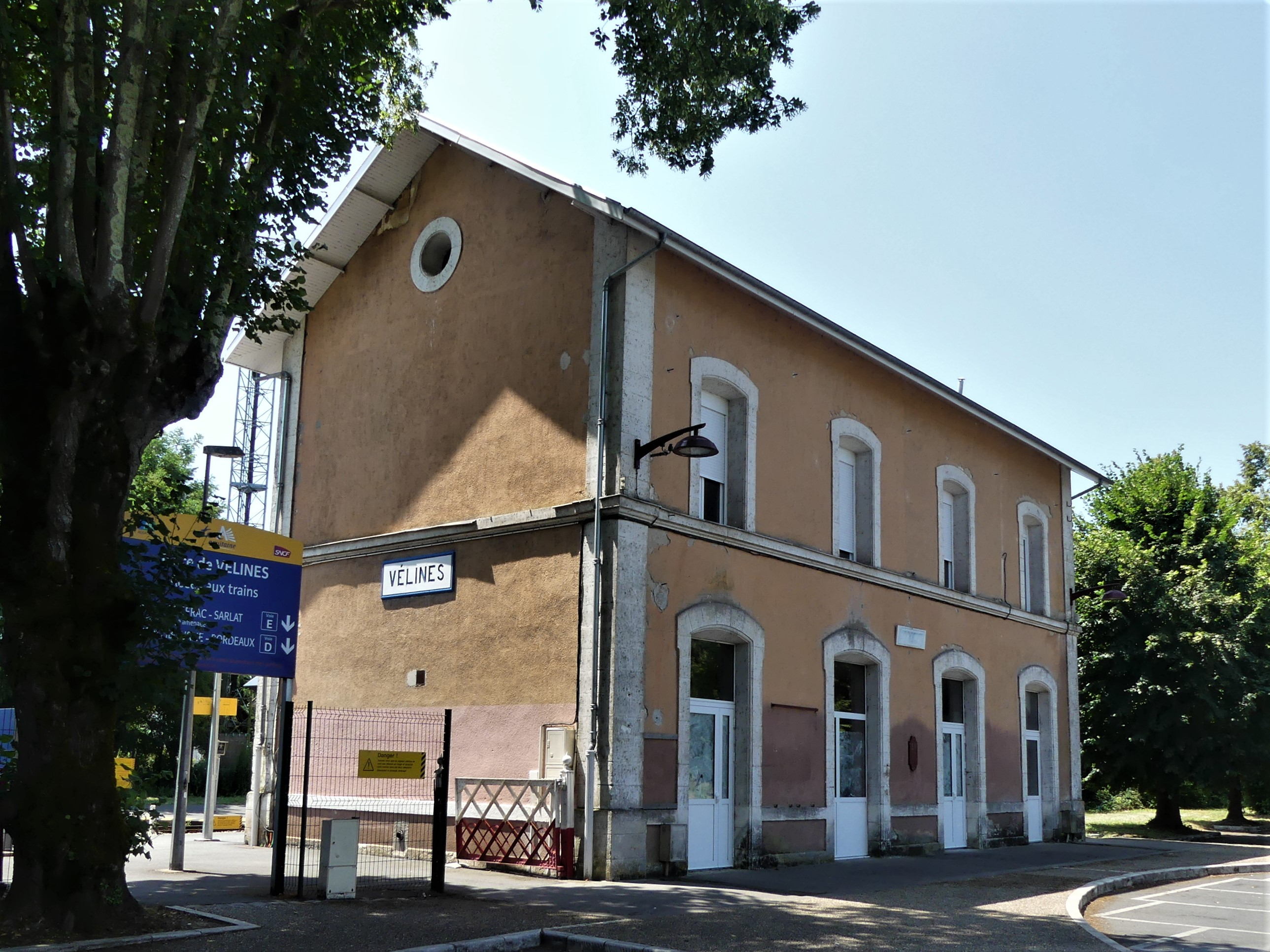 L'ancien bâtiment voyageurs de la gare de Vélines, Dordogne, France.